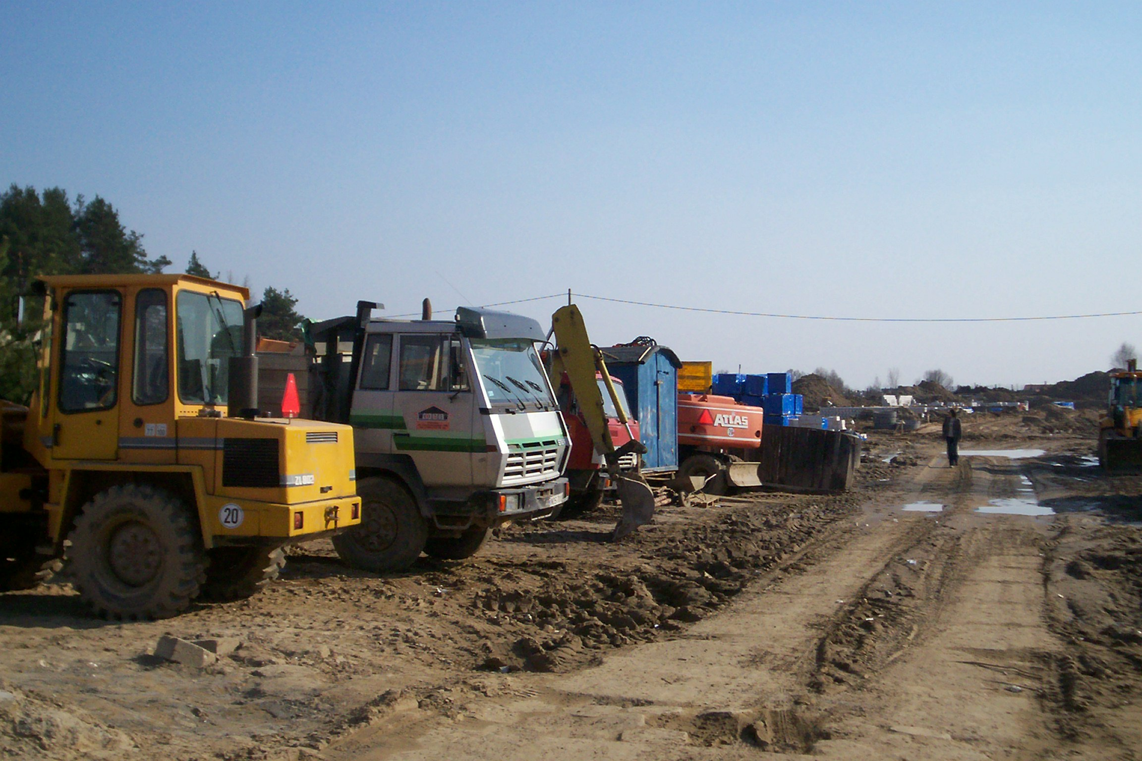 ul. Popiełuszki w Olsztynie, na etapie budowy os. Belweder